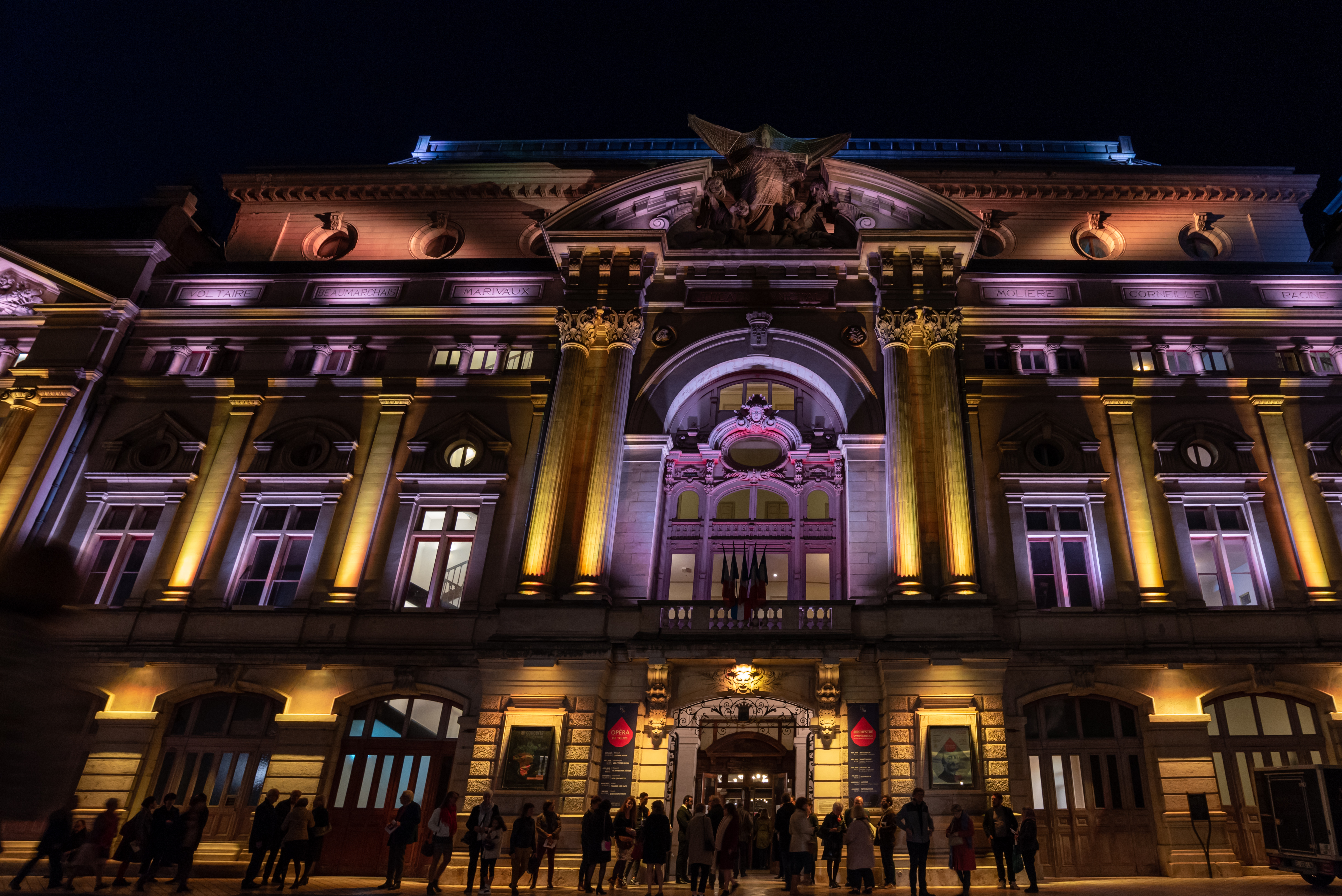 Façade extérieure du Grand Théâtre de Tours de nuit. Photo prise dans le cadre du Parcours Lumière dans les rues du Vieux Tours en octobre 2019